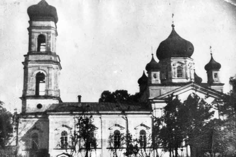 Троицкая церковь города Кузнецк